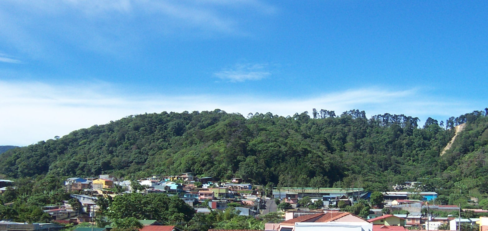 Barrio de Tirrases, Curridabat, San José, visto desde Hacienda Vieja, Curridabat